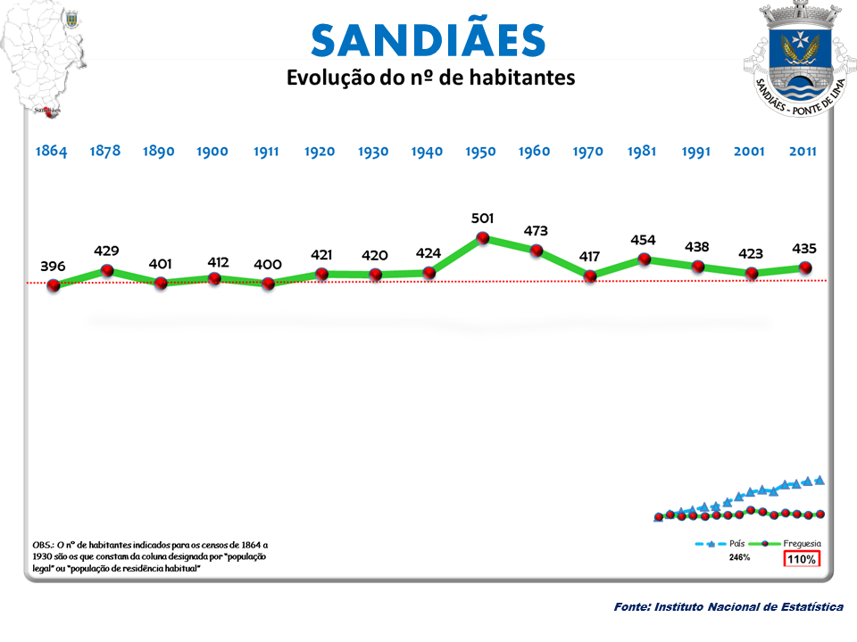 Censos 1864/2011